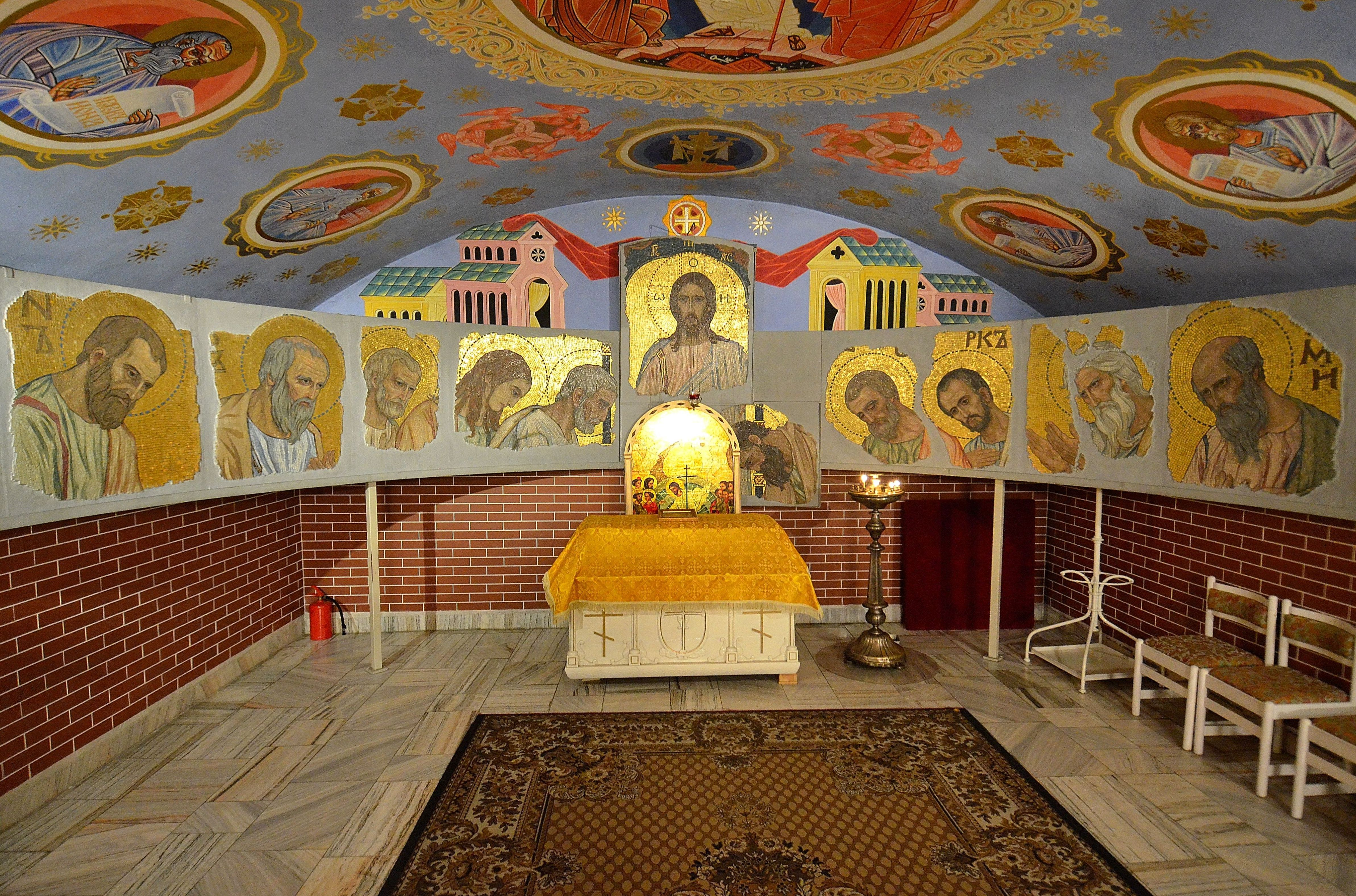 Fragmenty mozaiki Komunia Apostołów z soboru św. Aleksandra Newskiego w dolnej kaplicy katedry św. Marii Magdaleny w Warszawie